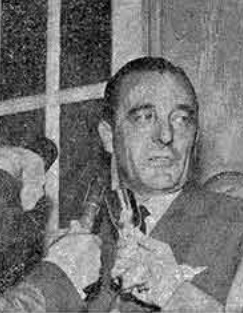 El Brigadier General Adolfo Teodoro Álvarez saliendo del despacho presidencial de Juan Carlos Onganía, tras haber formulado su solicitud de pase a retiro.